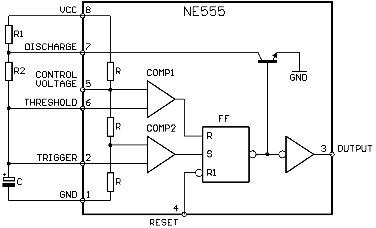 NE555, vereinfachtes Innenschaltbild, als astabiler Multivibrator